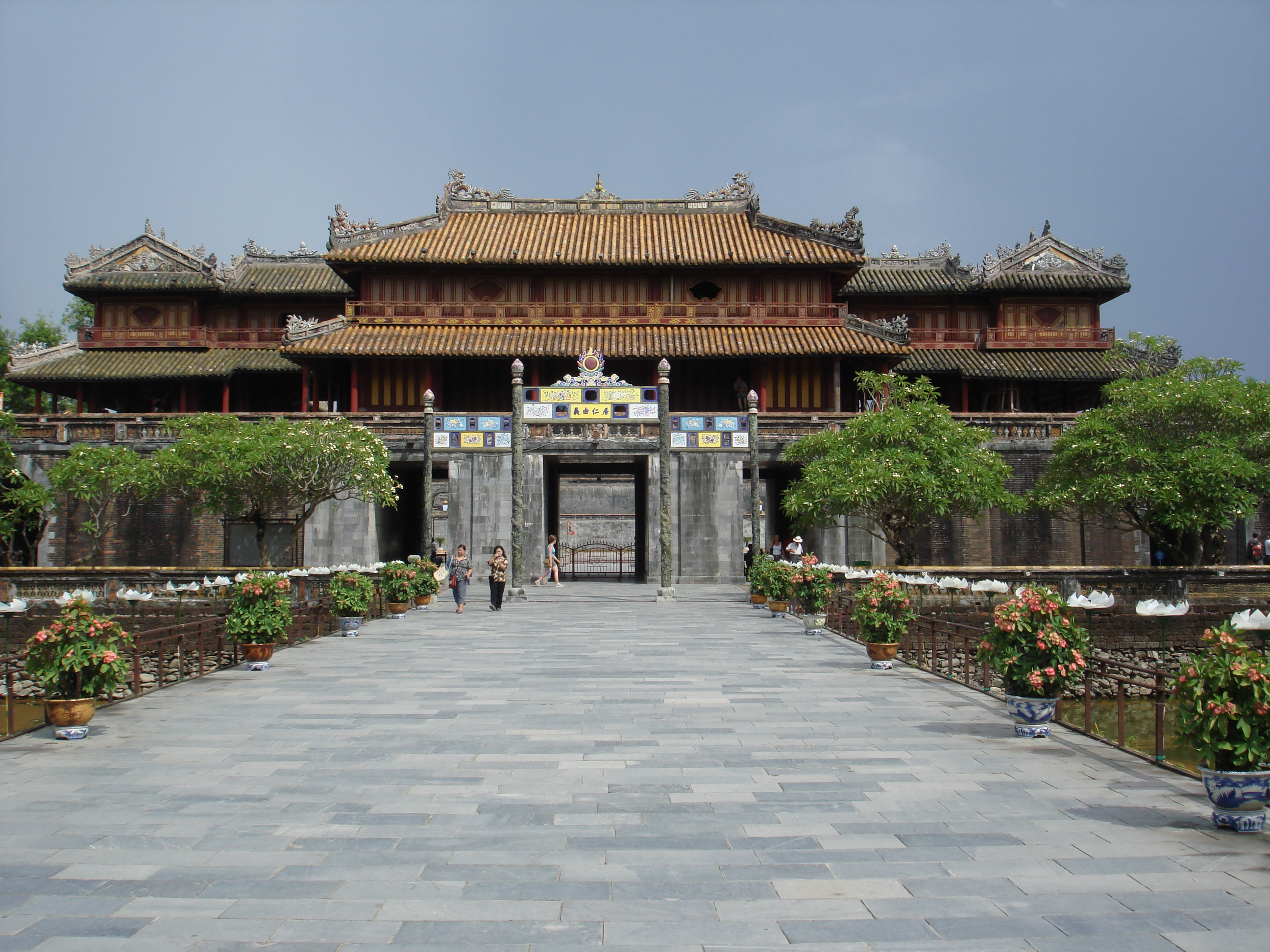 Điện Thái Hòa nhìn từ mặt trước.